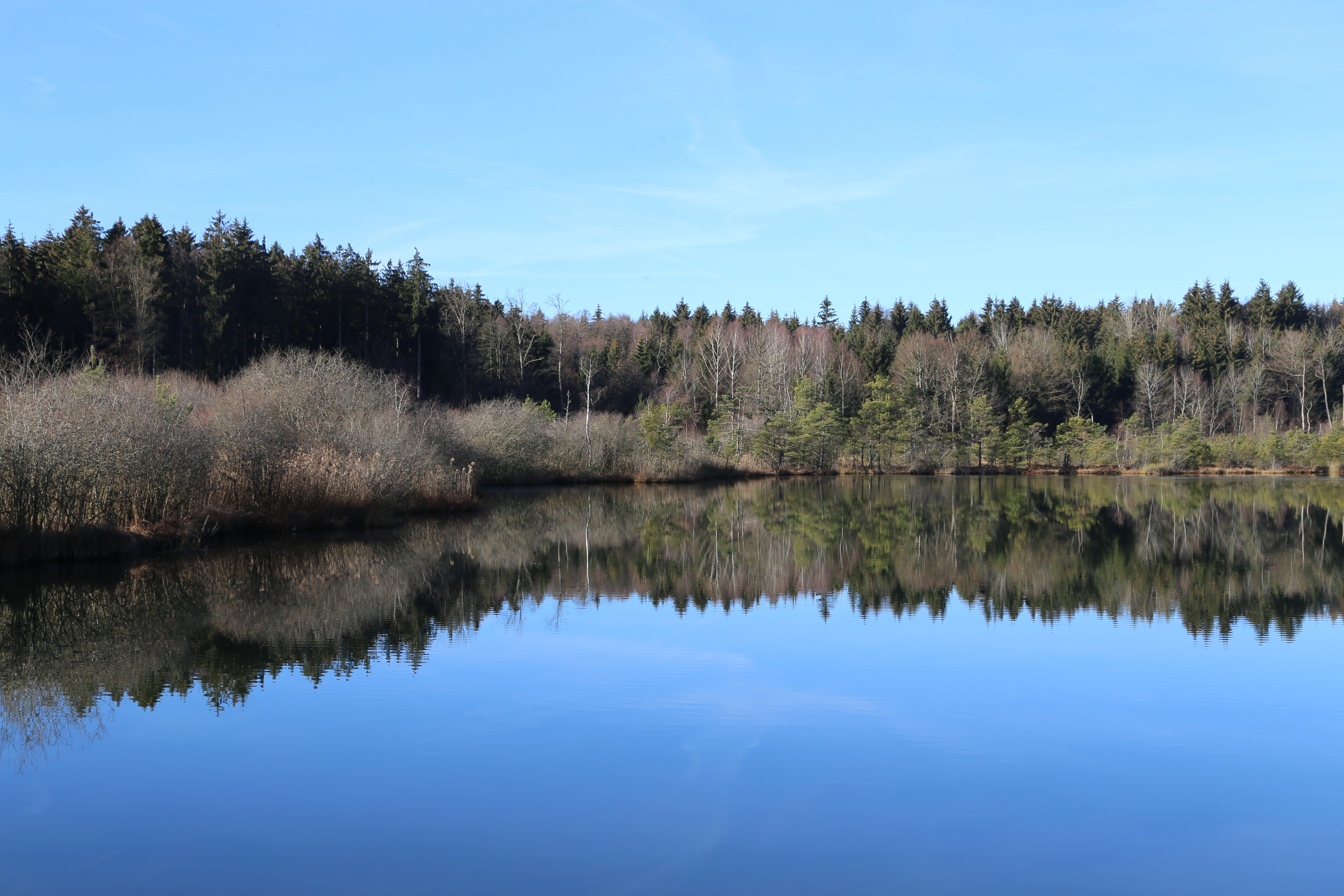 Kastenseeoner See, Glonn; Landschaftsschutzgebiet Toteiskessellandschaft Kastenseeon, LSG-00376.01